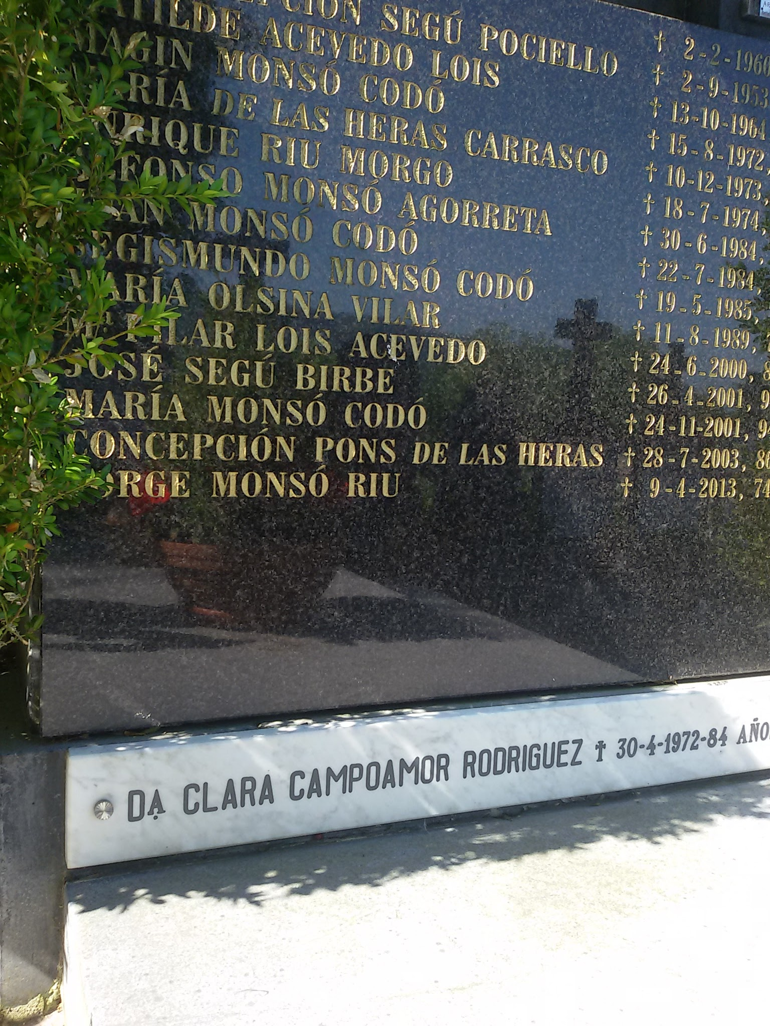 Clara Campoamorren Panteoia